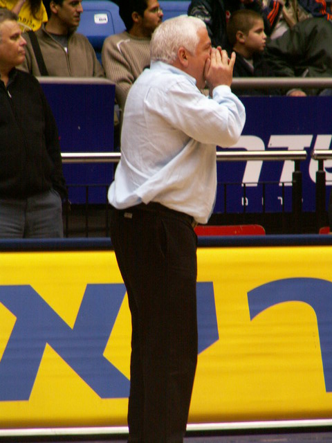 פיני גרשון, המאמן שהביא למכבי 3 גביעי אירופה צולם על-ידי אבי קדמי This picture was taken by Avi Kedmi